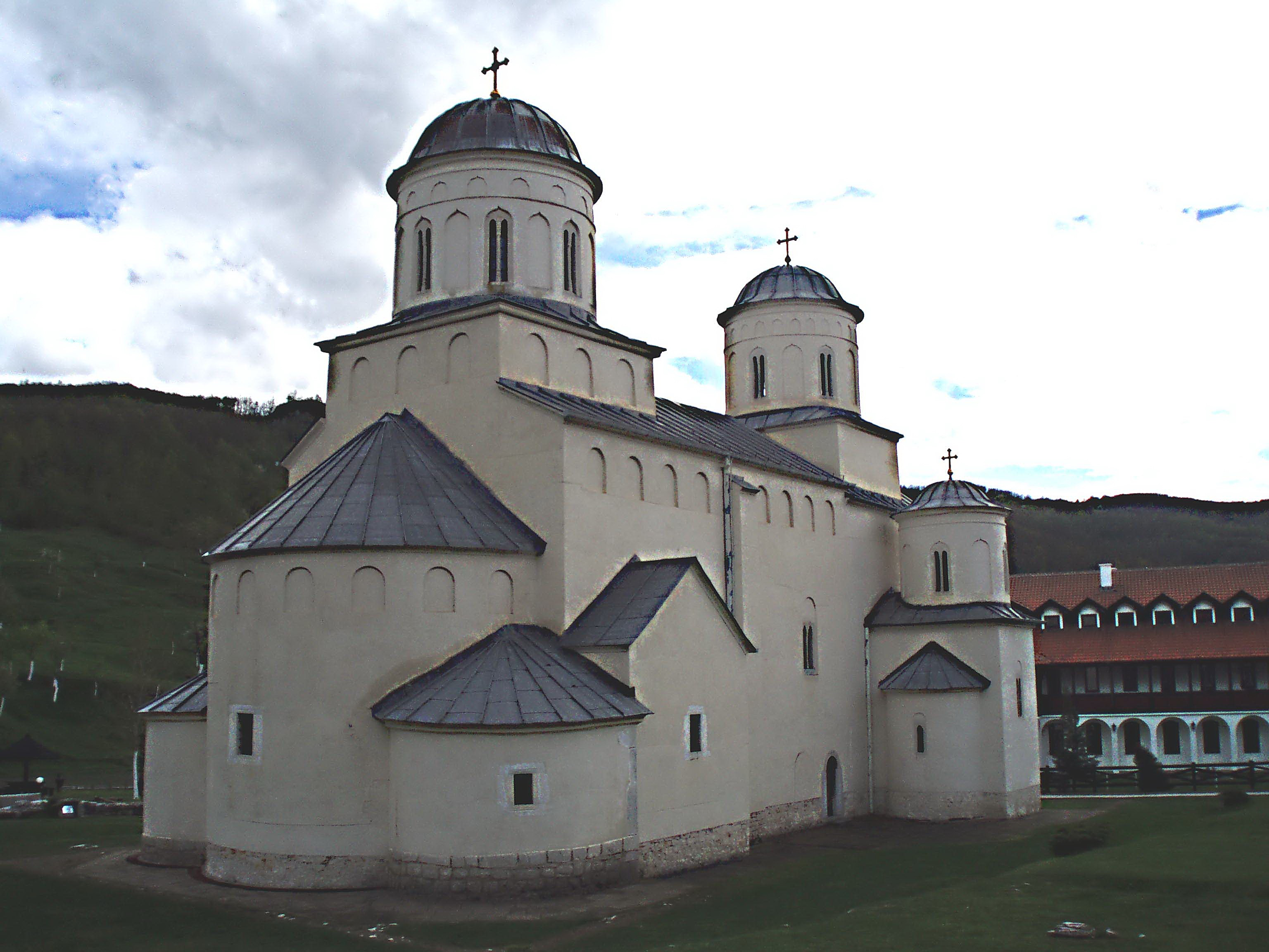 Mileševa monastery